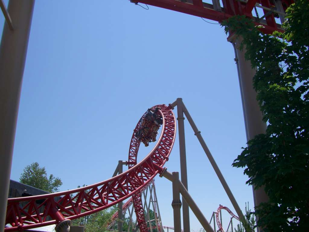 Maverick , montagnes russes à Cedar Point